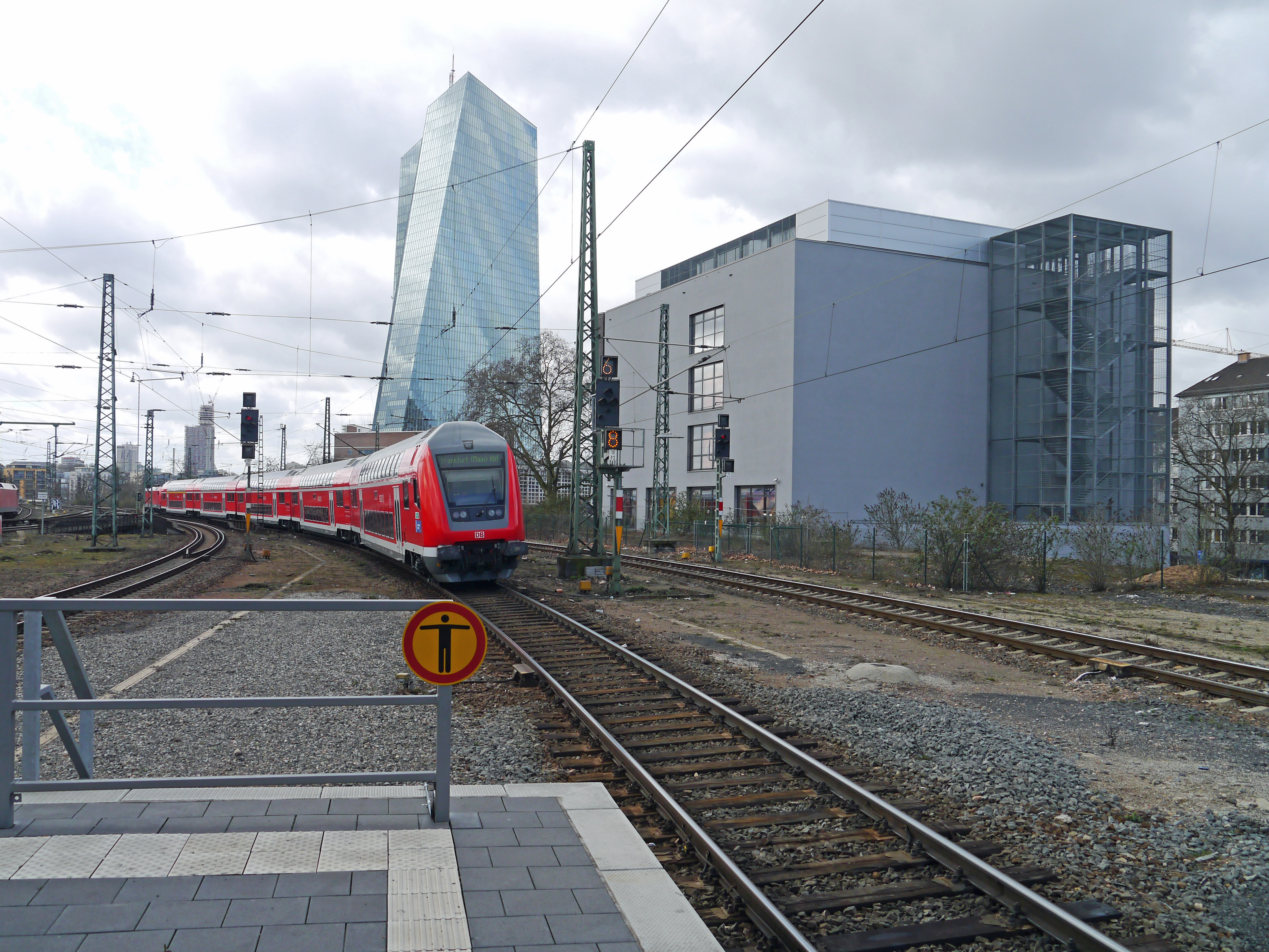 Die neuen Bahnsteige 2016 im Ostbahnhof in Frankfurt am Main. Richtung Südbahnhof, mit Blick auf die Europäische Zentralbank.